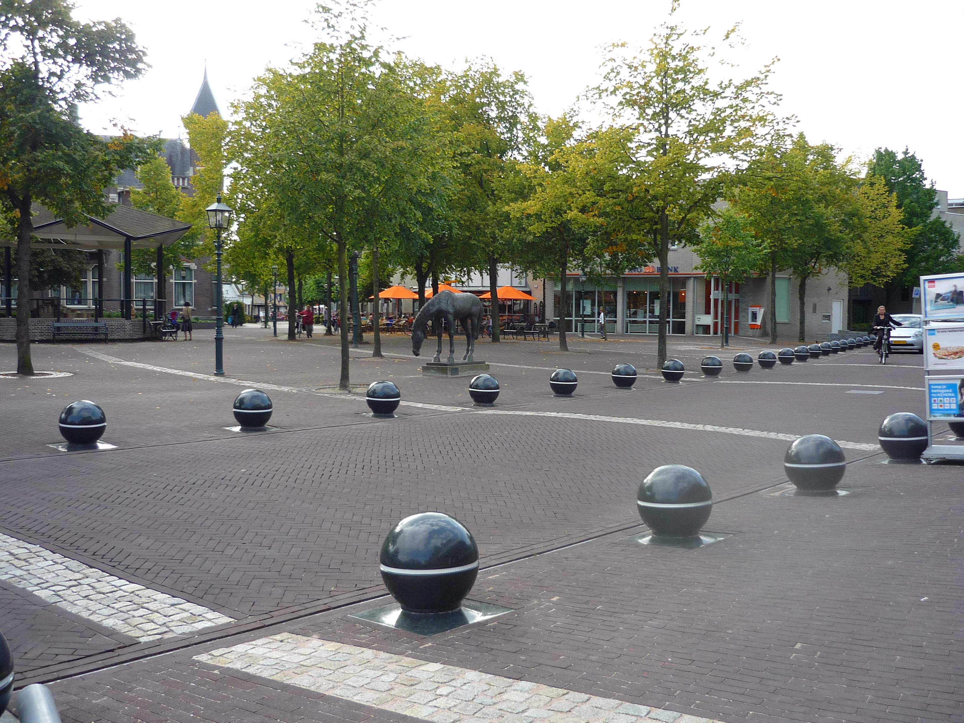 Overzicht de Brink te Baarn